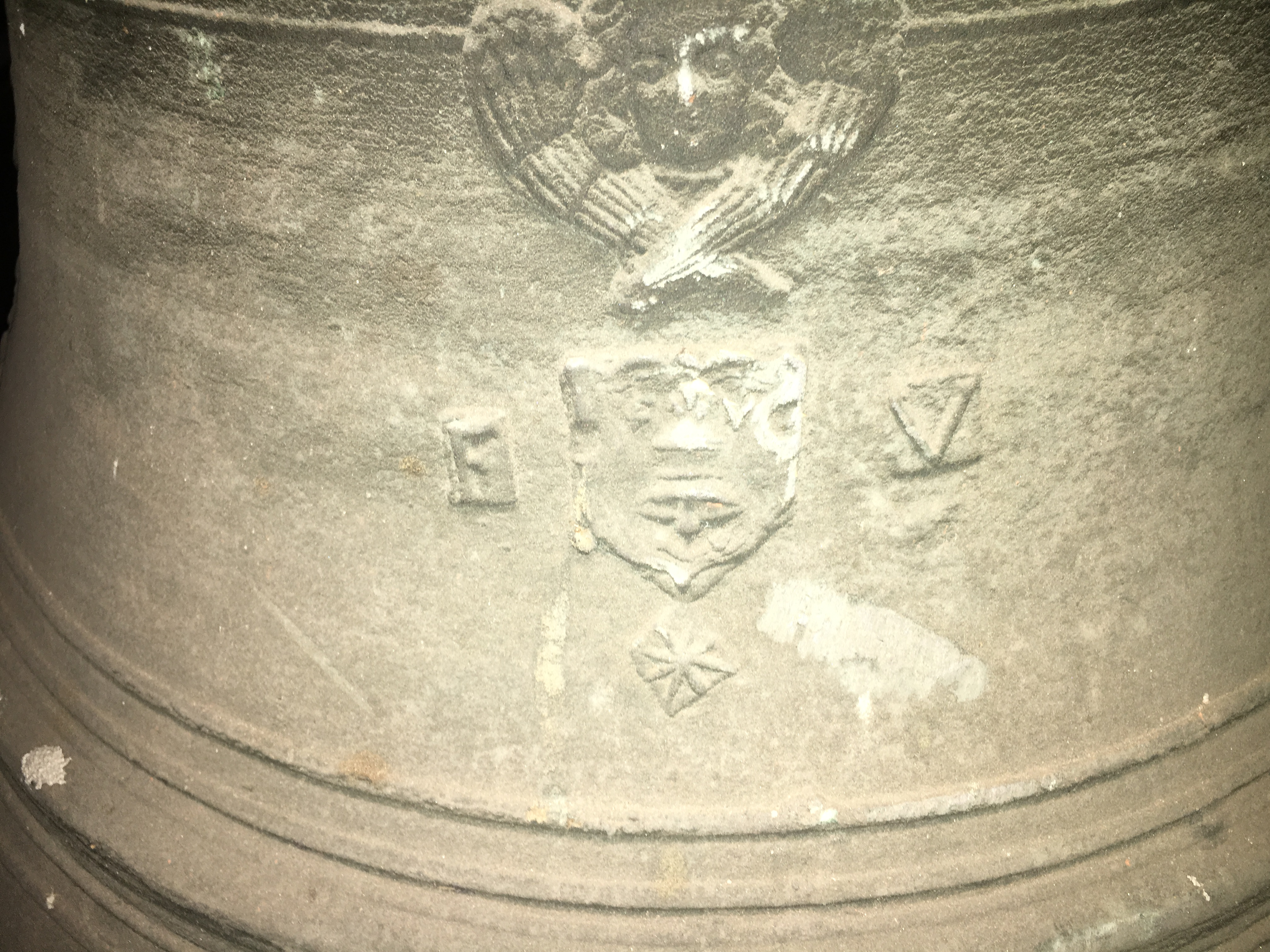 Glocke im Turm der Kirche St. Josef in Bloischdorf